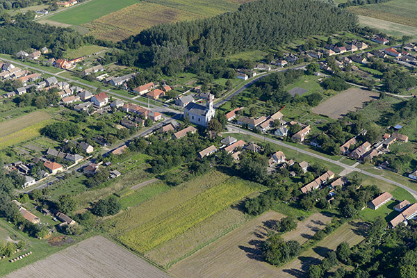 Bakonyszentiván, légi fotó 1.